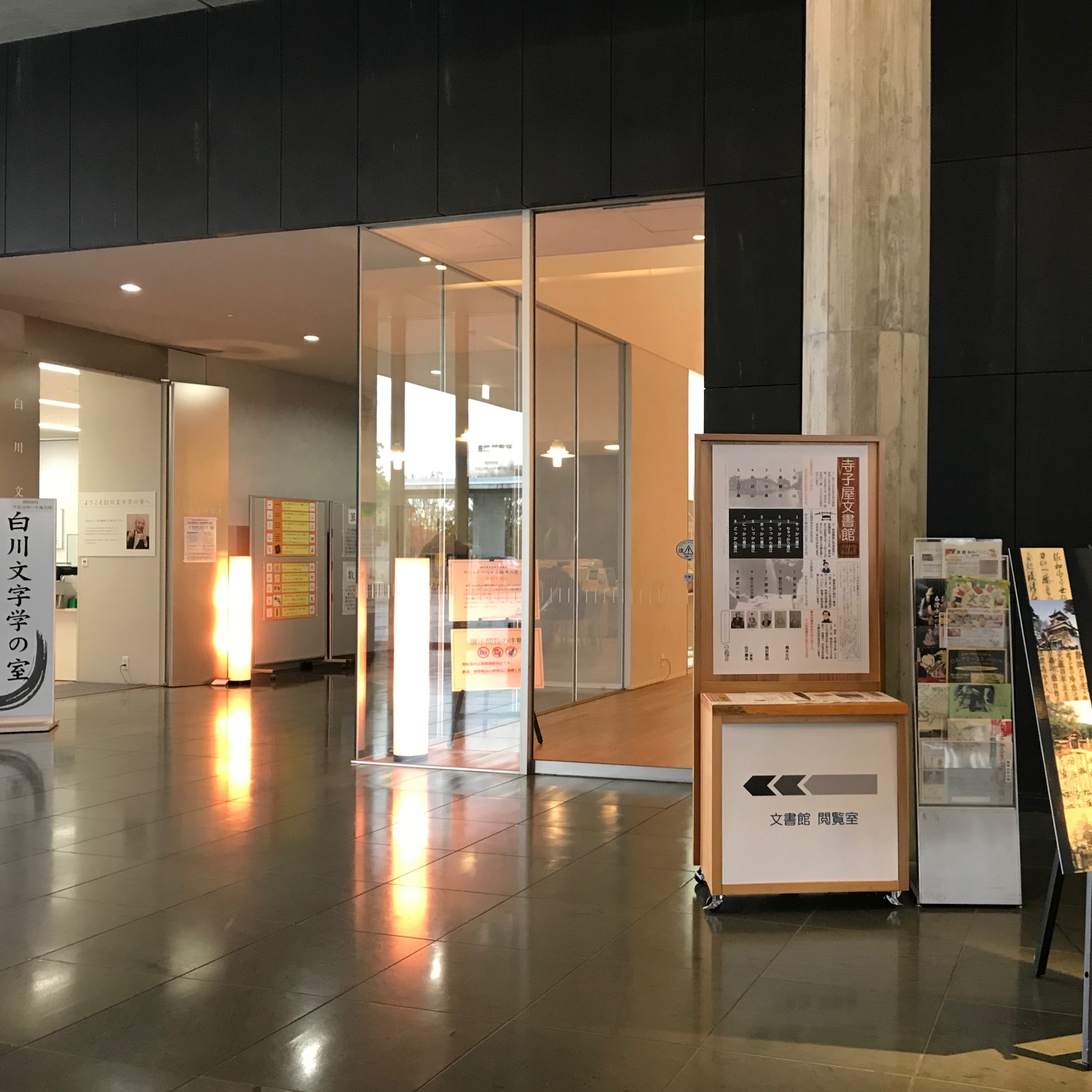 福井県立図書館と同一施設内にある福井県文書館。エントランスホールの左手奥に閲覧室の入口があります。